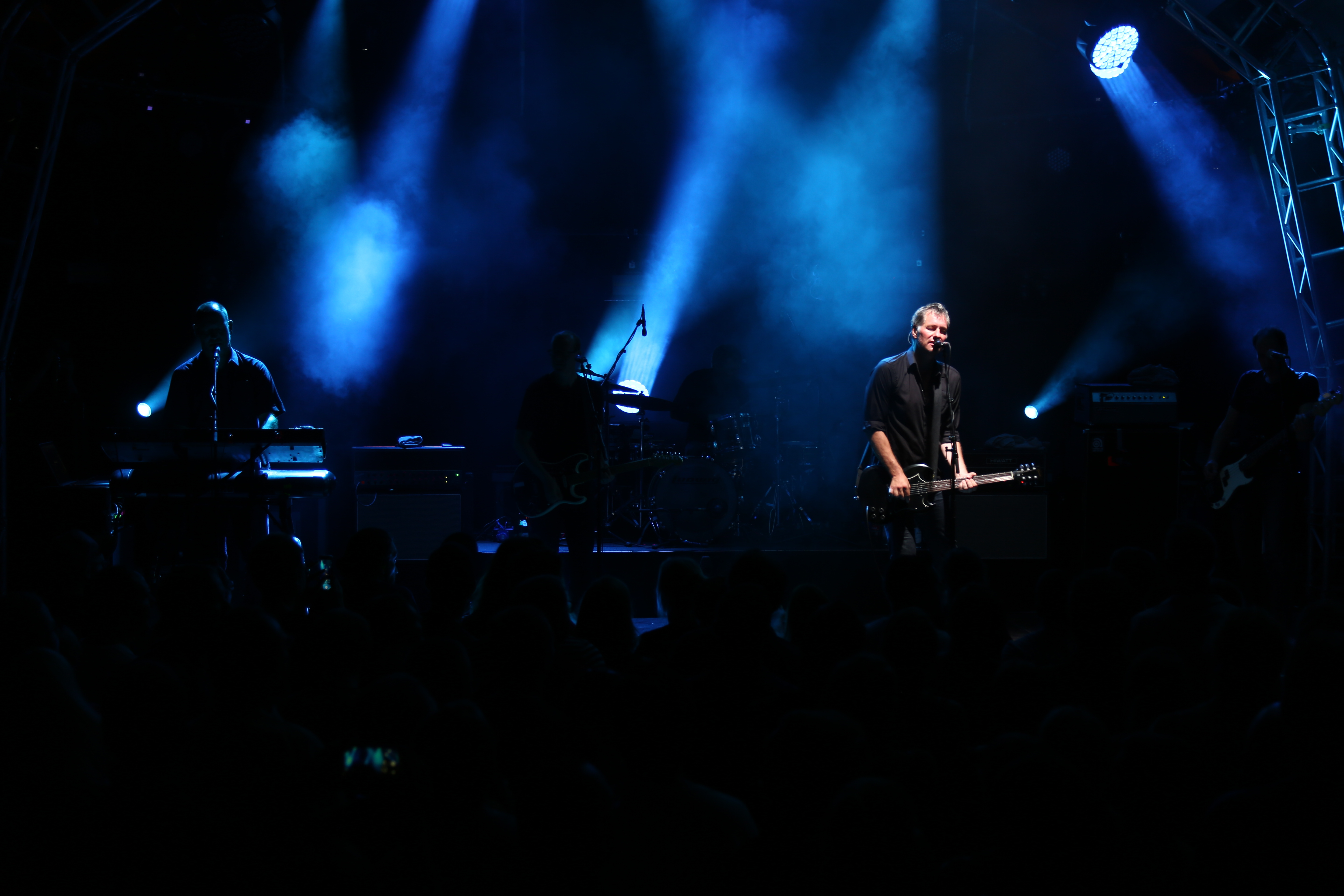 Kettcar am 17. August 2018 im Münchner Theatron. Marcus Wiebusch